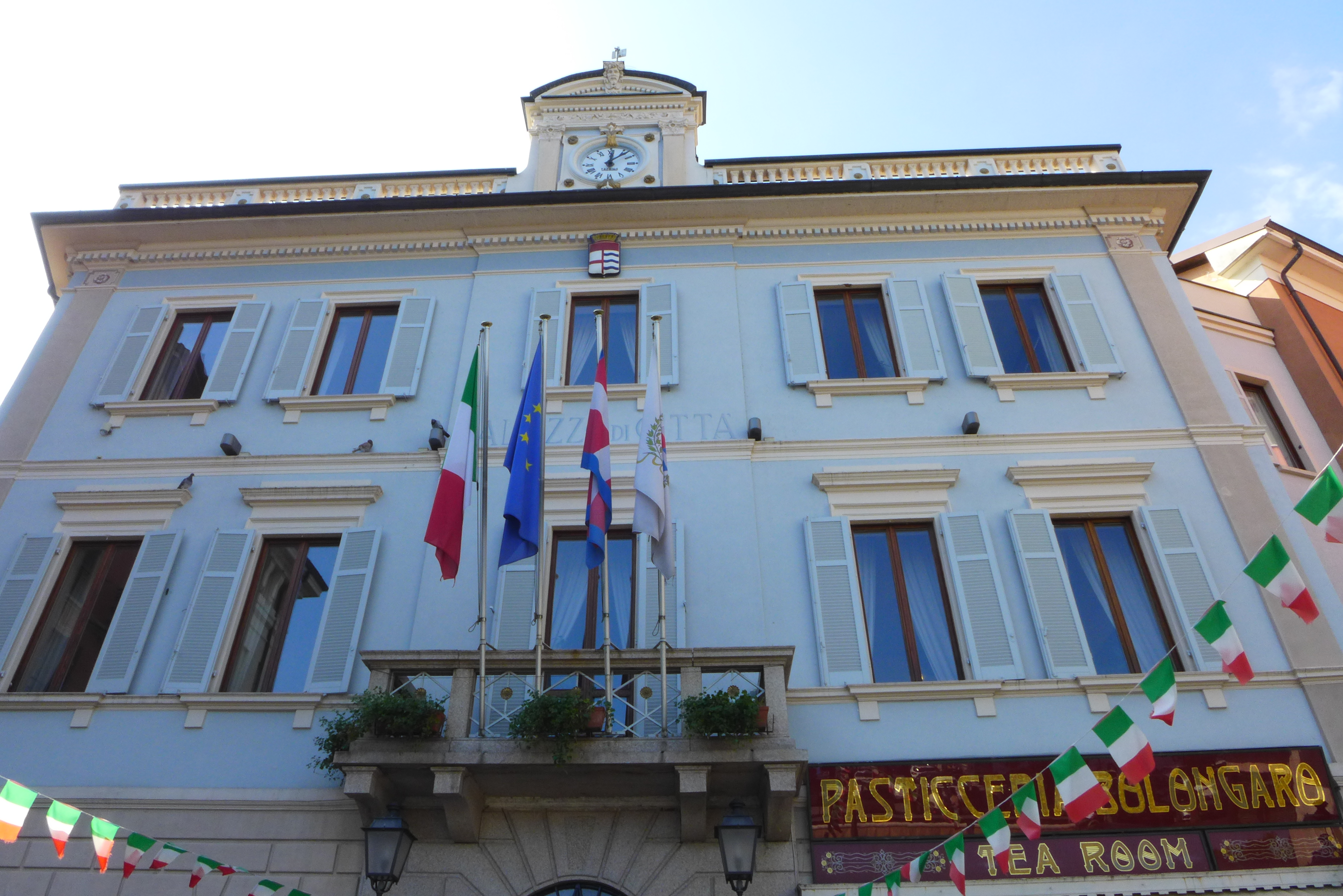 Palazzo Municipale Stresa This is a photo of a monument which is part of cultural heritage of Italy.